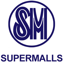 SM Supermalls Logo